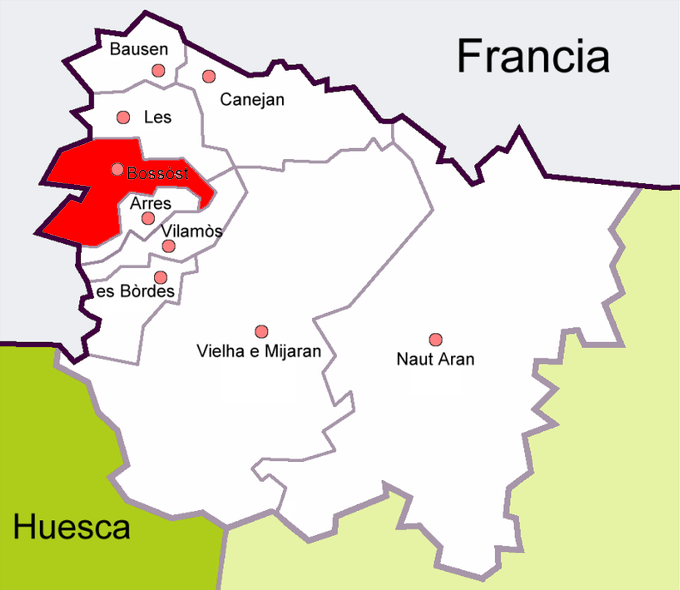 Municipio de Bossost en el Valle de Arán